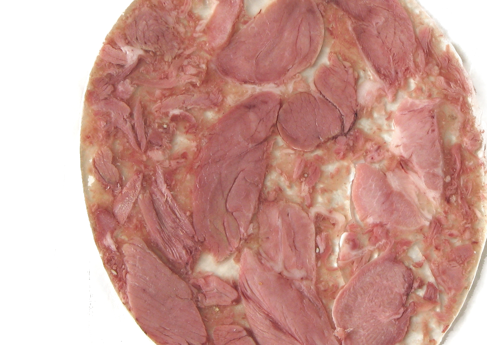 salceson